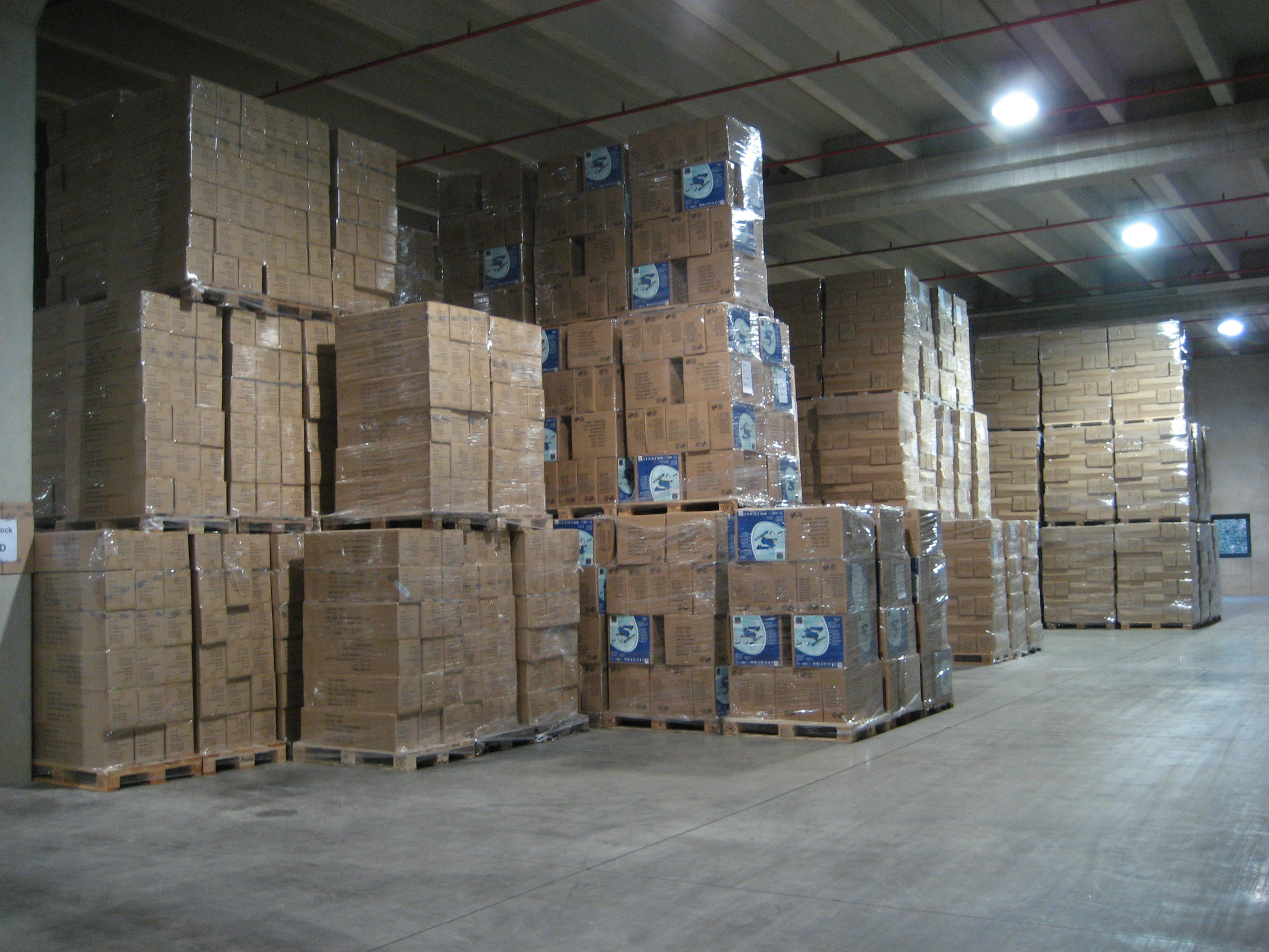 Blocklagerung von Sportartikeln, bei HUDORA in Remscheid